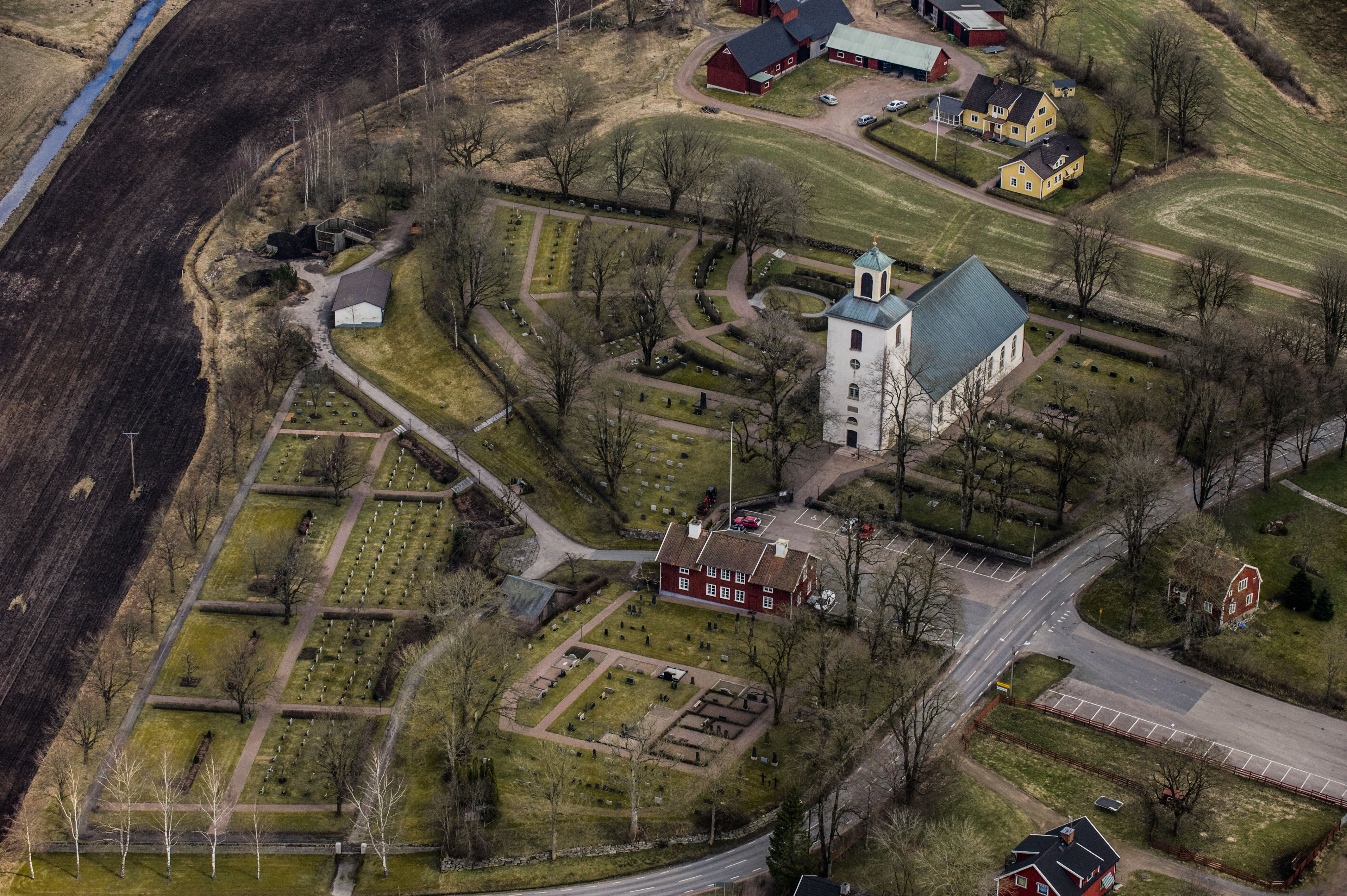 Reftele kyrka från luften